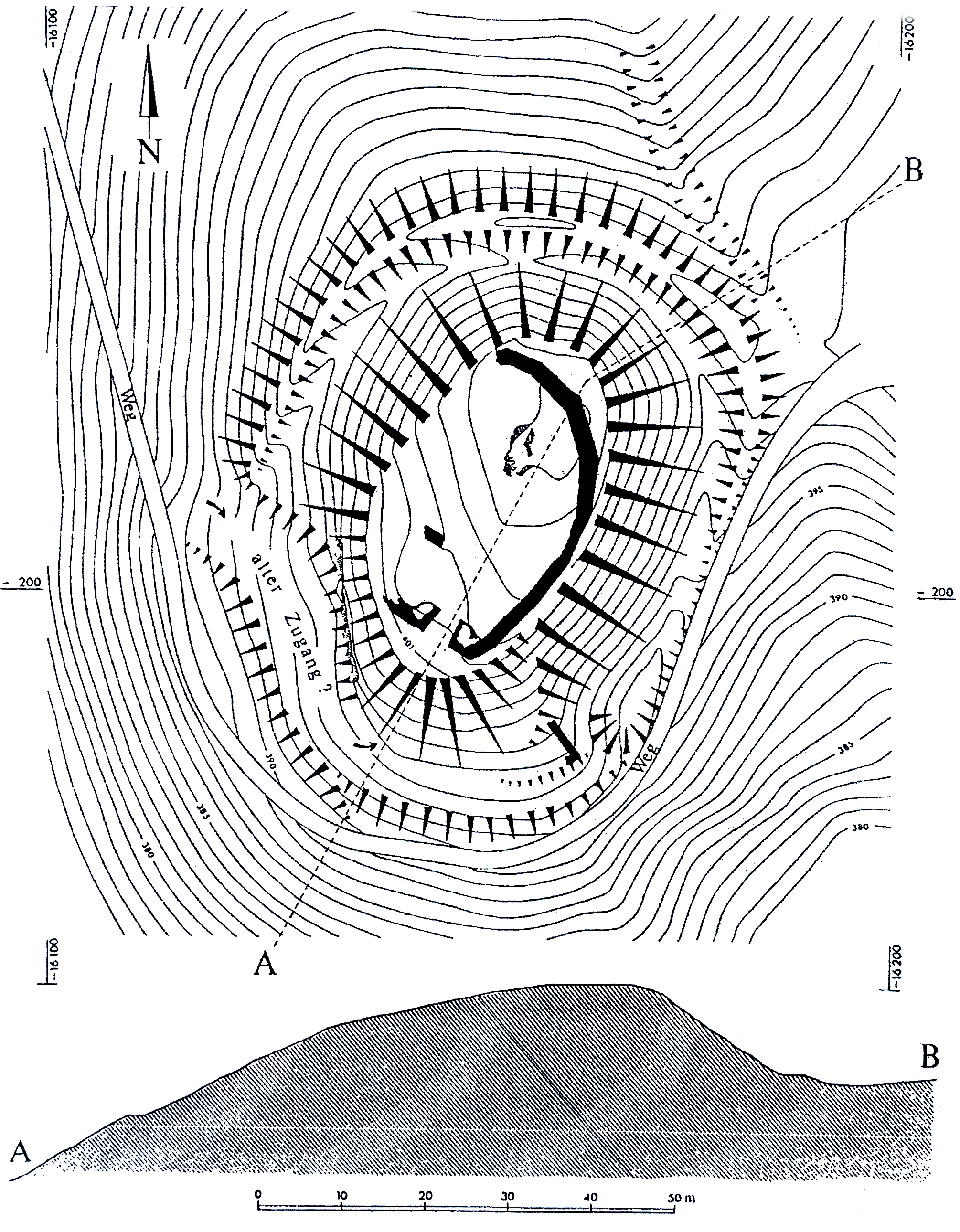 Grundriss und Seitenriss des Burgstalls Schanzenköpfle